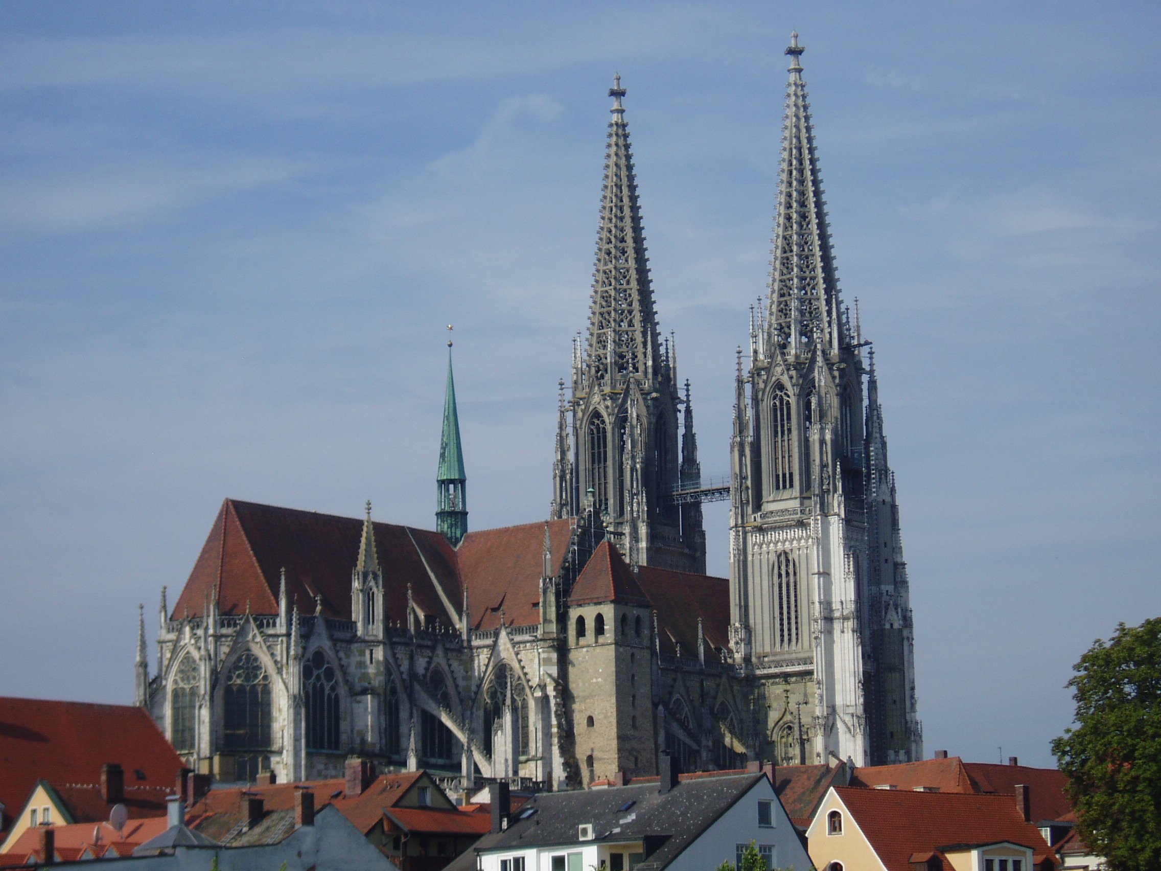 Regensburger Dom